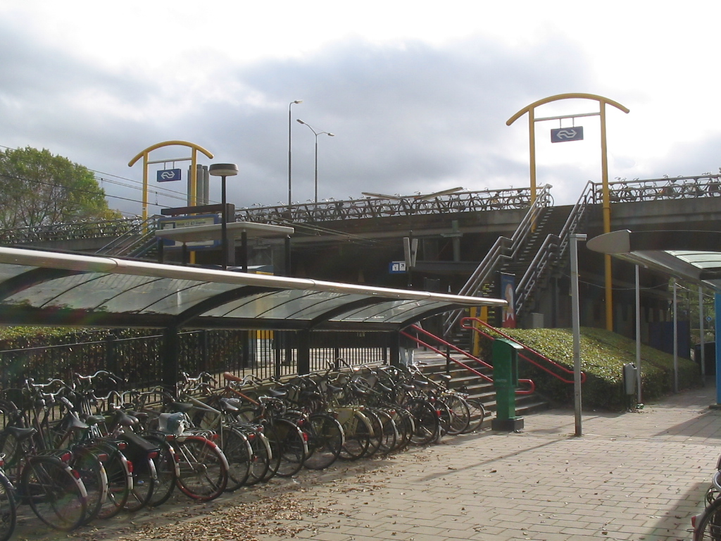 fietsenstalling op Delft Zuid